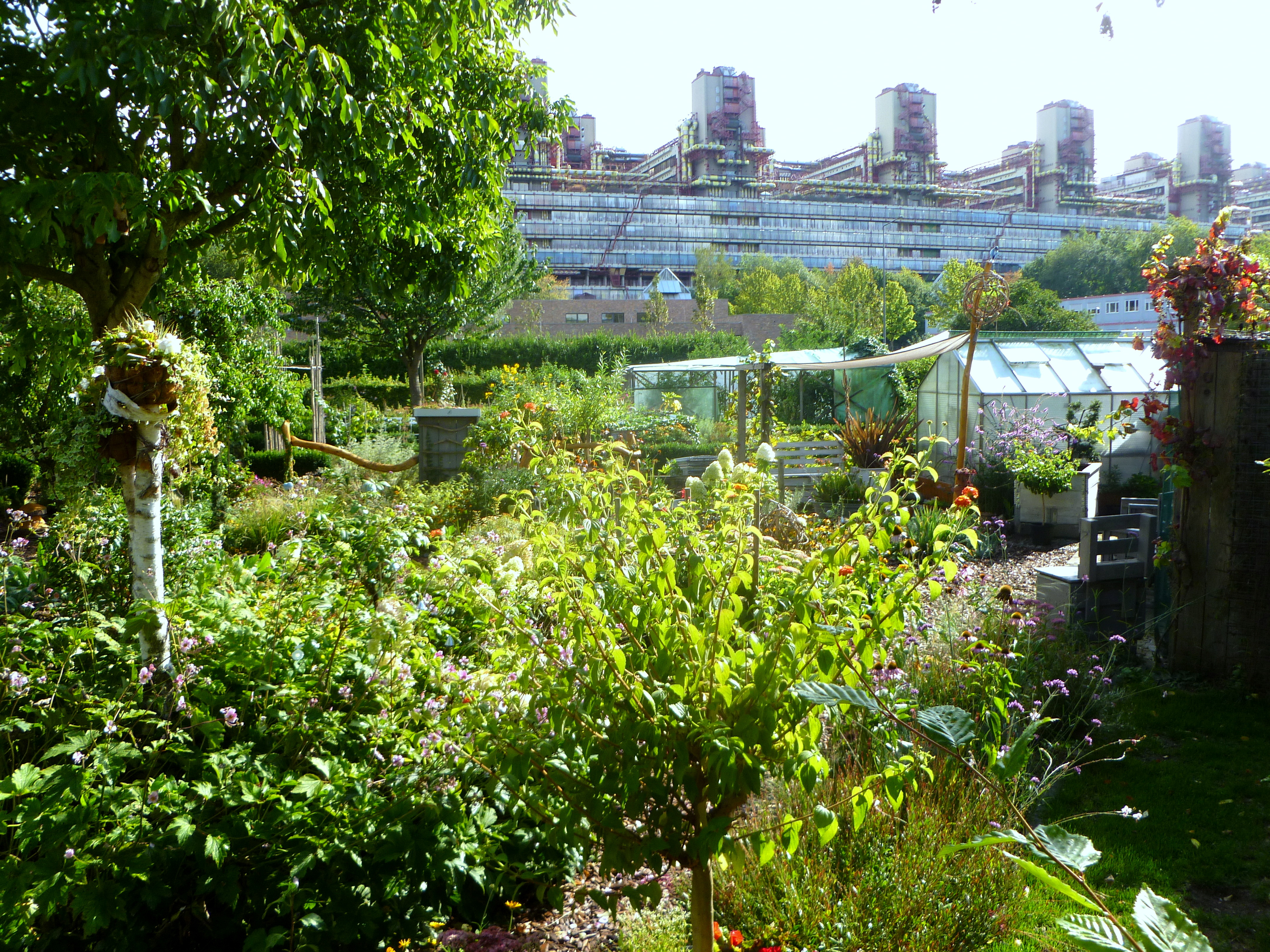 Medizinalsammlung des Biologischen Zentrums Aachen an Gut Melaten